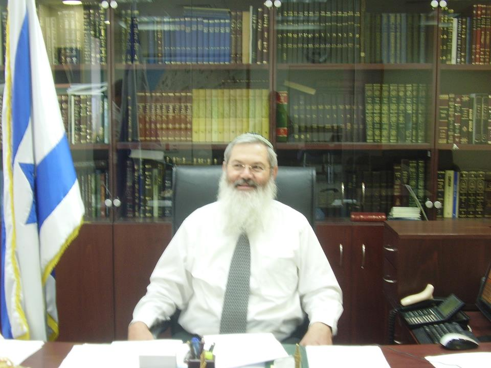 הרב אלי בן דהן